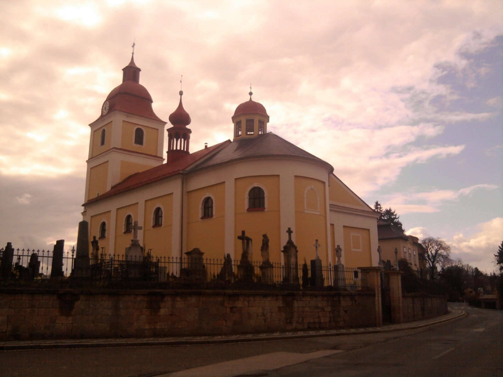 Kostel Všech svatých s farou (Lázně Bělohrad), Lázně Bělohrad